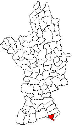 Categorie:Hărţi ale judeţului Olt